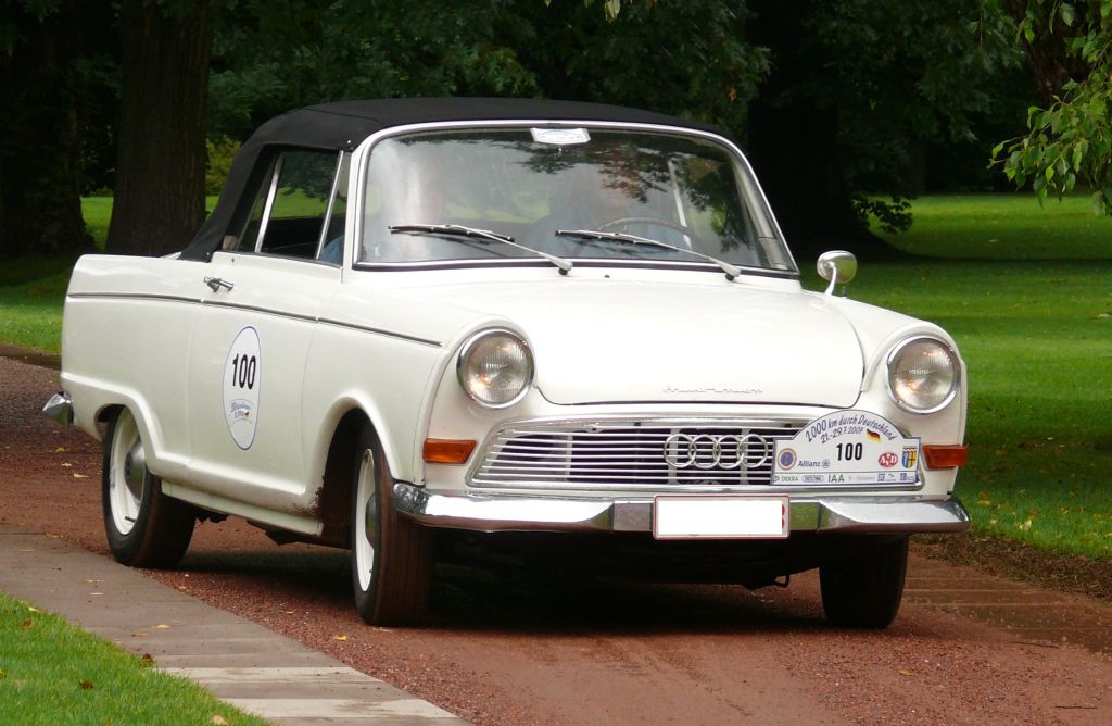 DKW F12 Roadster